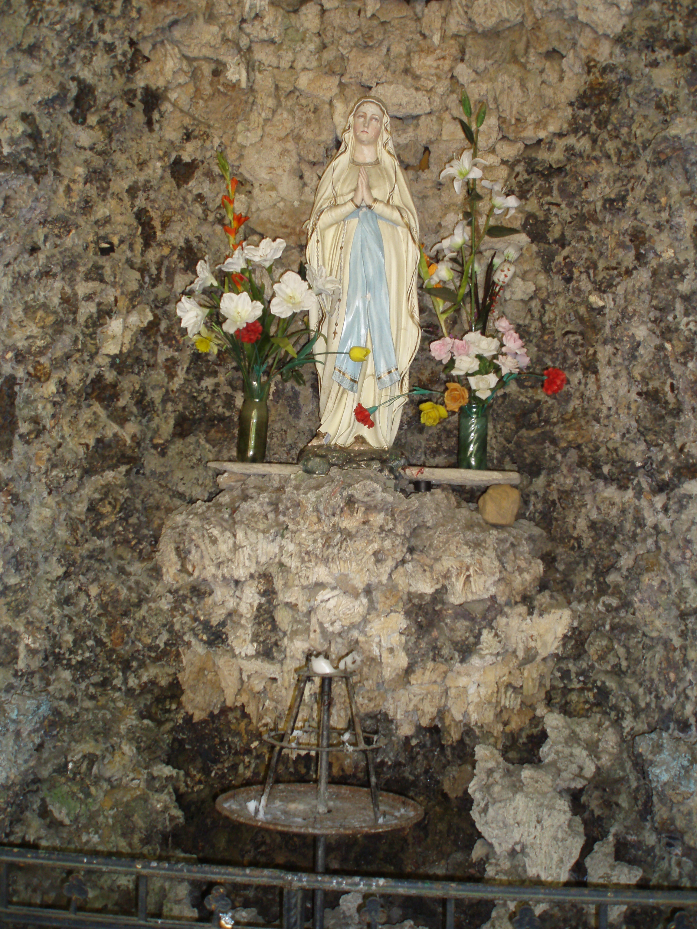 Modlivý důl u Svojkova, detail skalní kaple